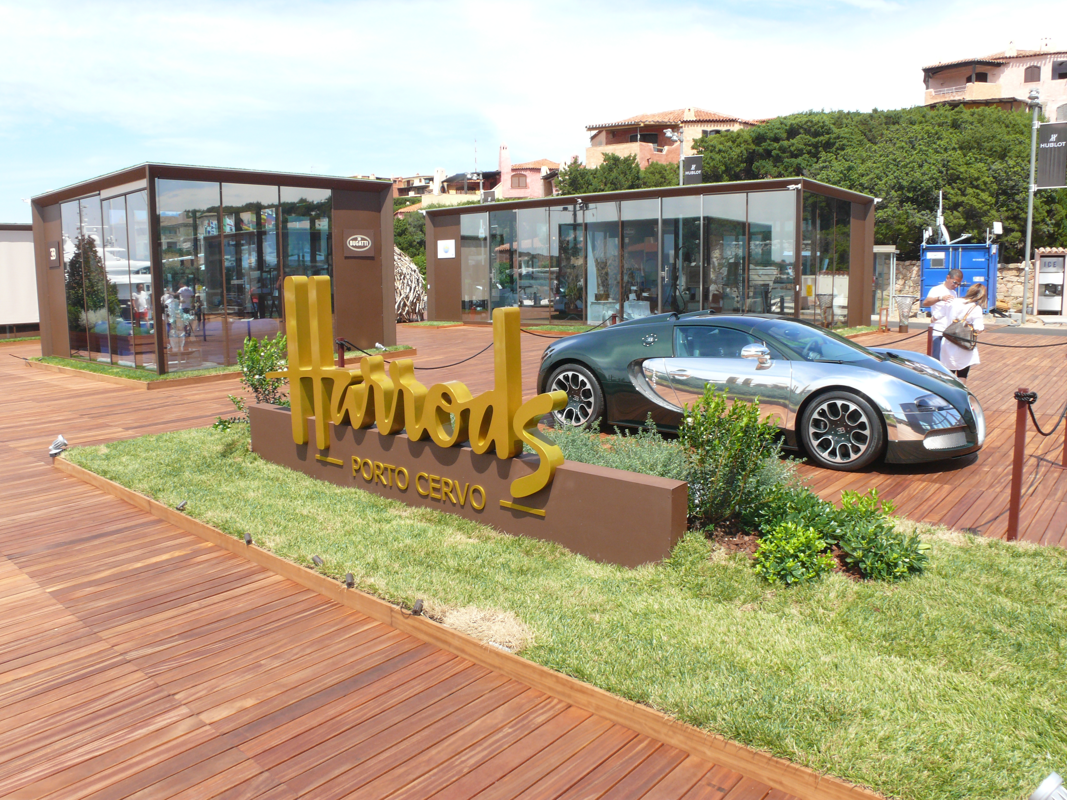 Sardinia, Sardegna